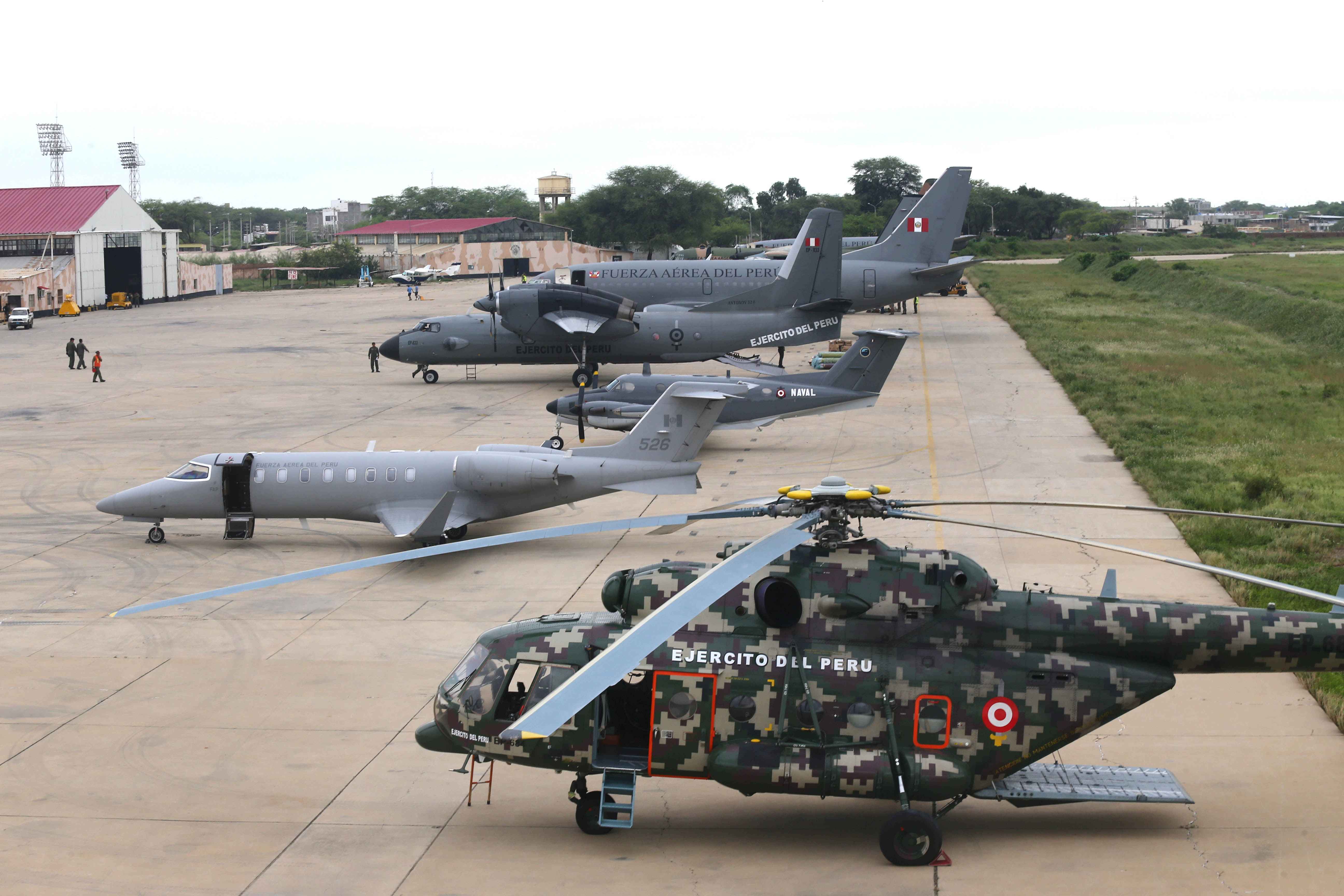 El Ministro de Defensa, Jorge Nieto Montesinos, viajó a Piura donde personalmente realizó las coordinaciones para la ejecución de las labores del sector Defensa y las Fuerzas Armadas ante la emergencia que azota la región.